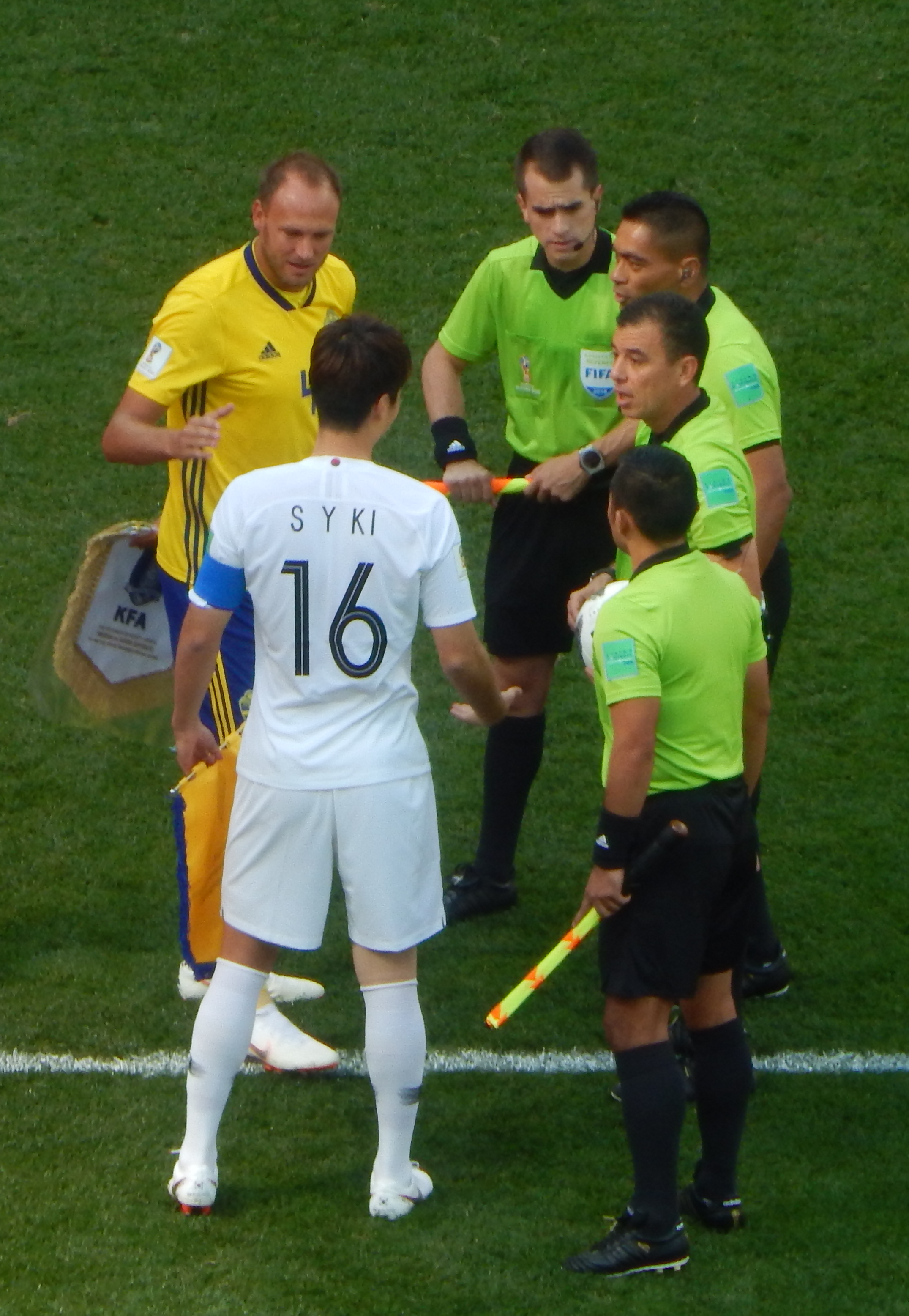 Капитаны и судьи перед матчем